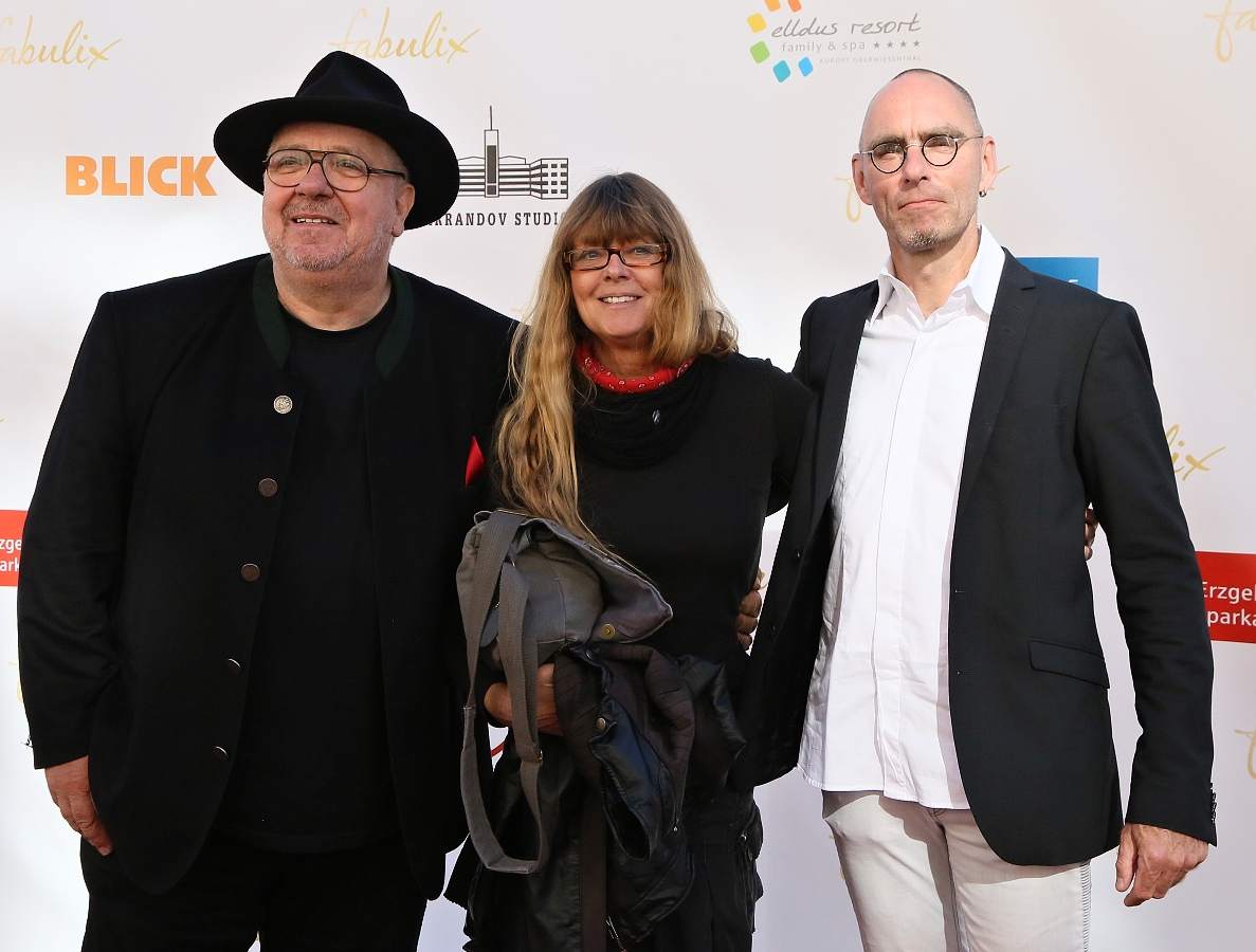 Michael Schanze in Begleitung auf dem Filmfestival Fabulix